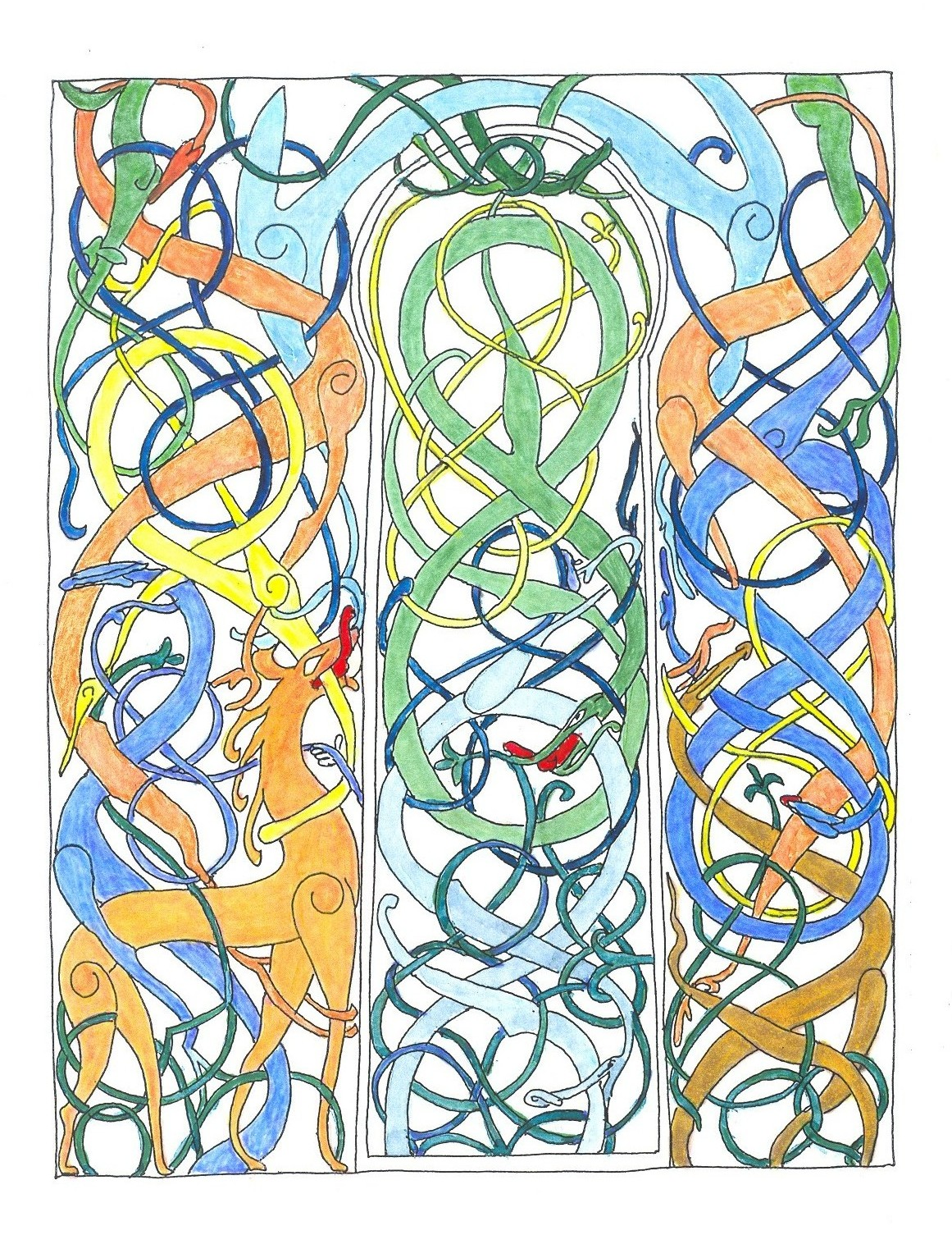 Az urnesi fatemplom kapujának sárkányos rajza festéssel kiemelve a figurákat, Dánia